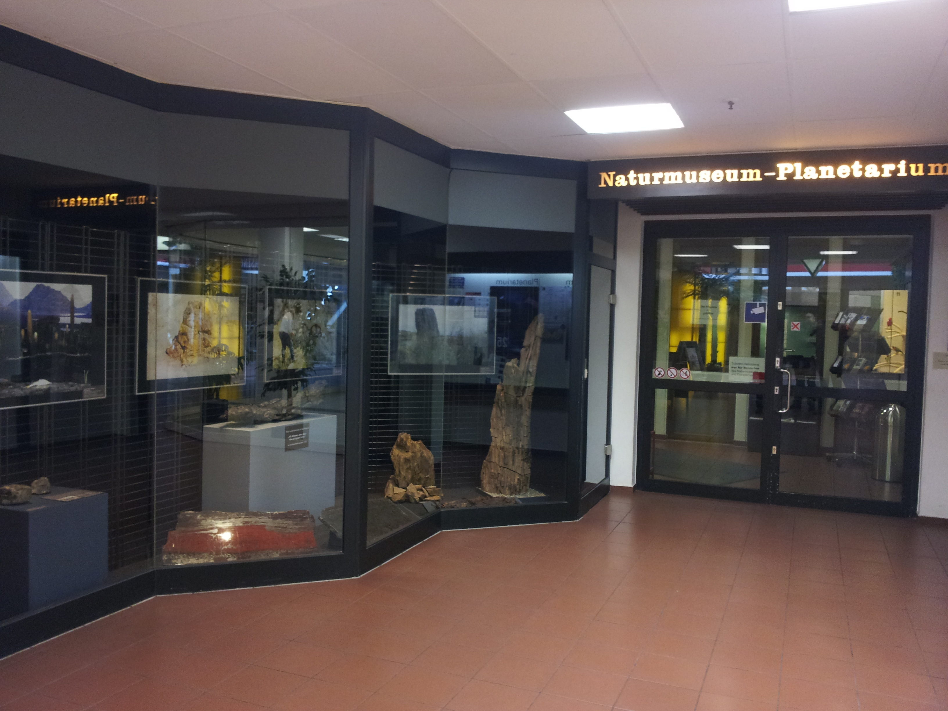 Der Eingang zum Naturmuseum und Planetarium in Augsburg